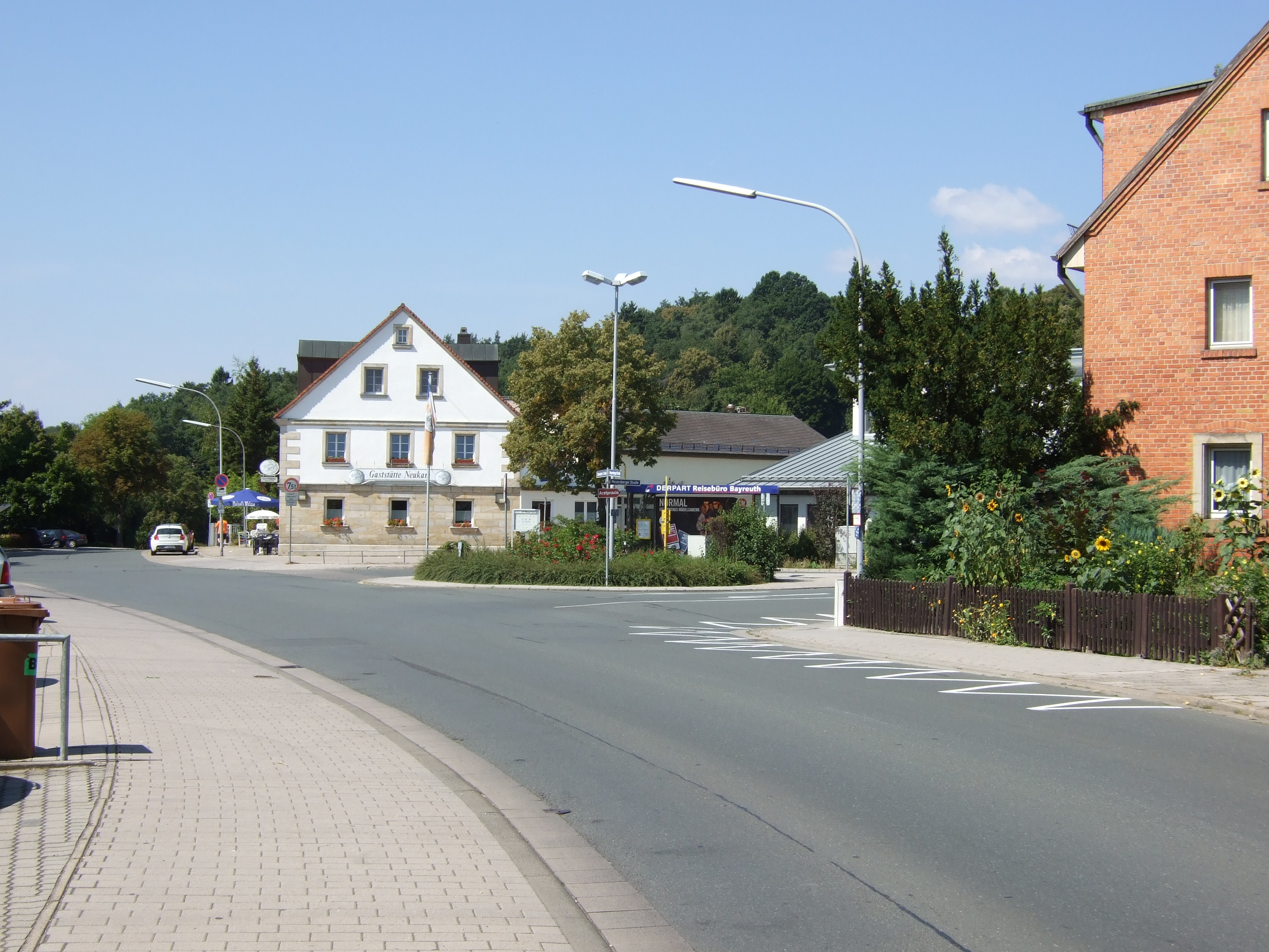 Ortskern Meyernberg Bayreuth